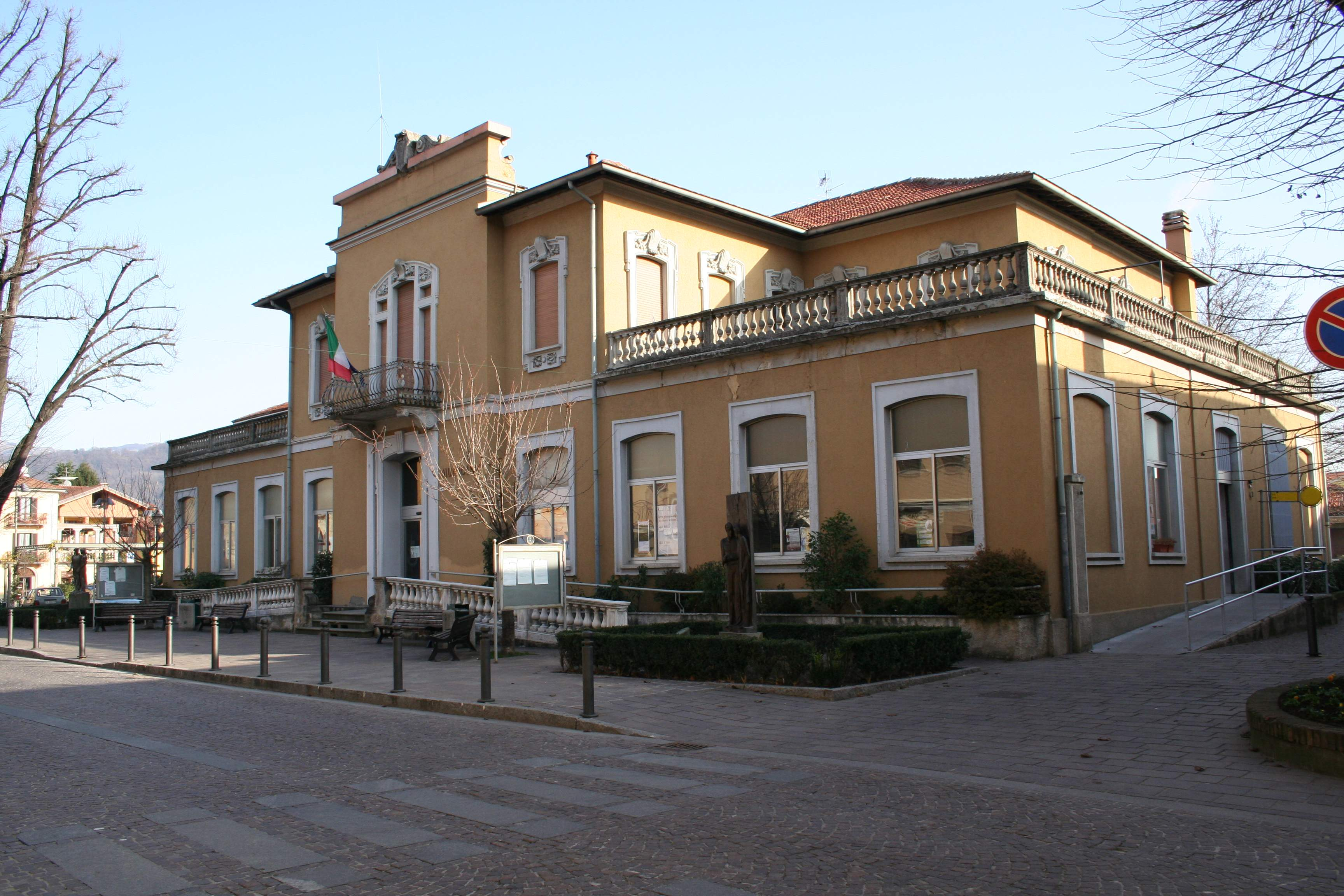 Municipio